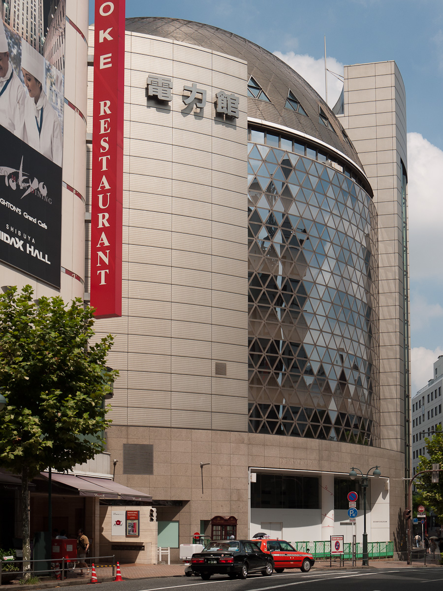 東京電力「電力館」、東京都渋谷区神南1丁目。